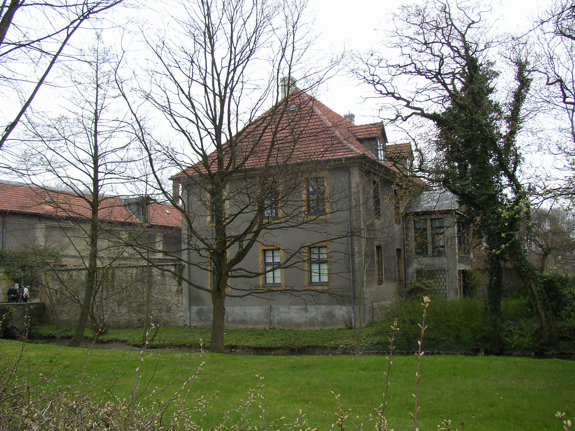 Werther (Westf) - Haus Werther